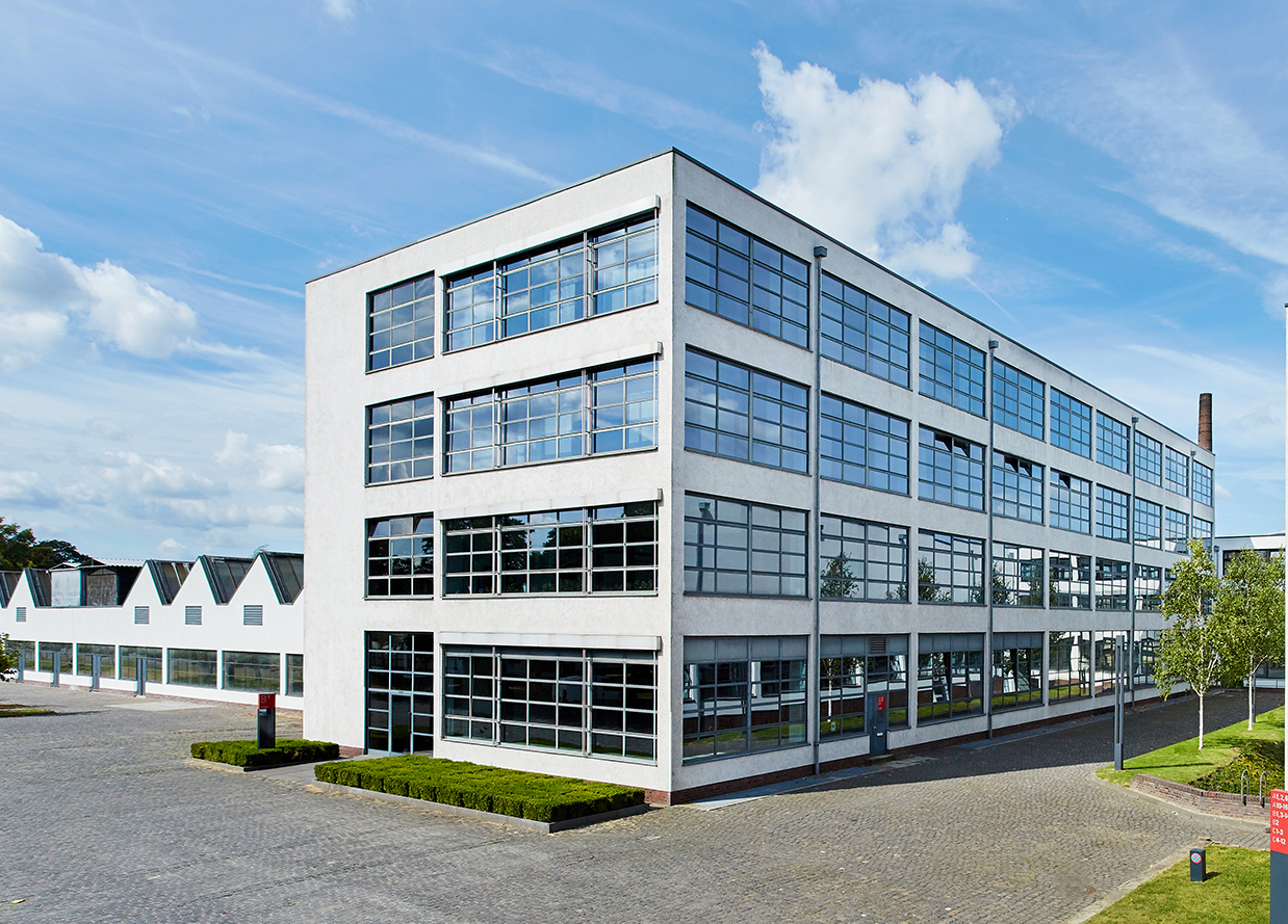 Das Gebäude für Herrenfutterstoffe im Mies van der Rohe Business Park, die ehemaligen Gebäude der VerseidAG.